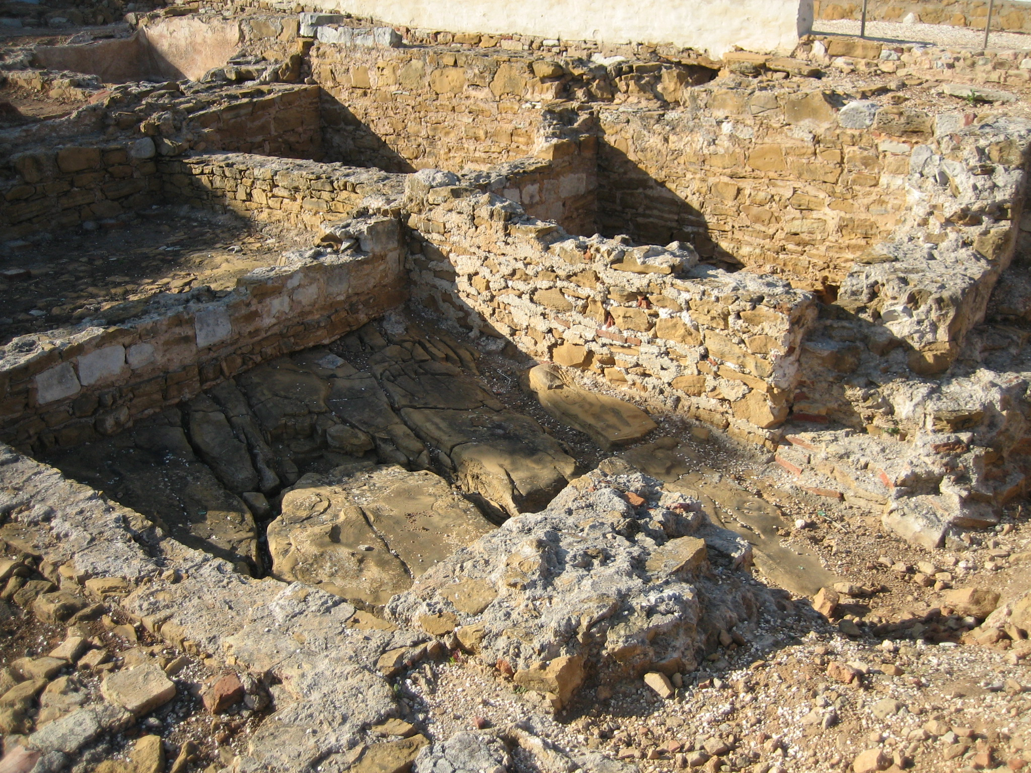 Roman Baths, Luz